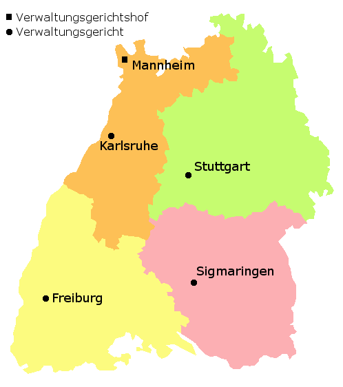 Gerichtsbezirke der Verwaltungsgerichtsbarkeit in Baden-Württemberg